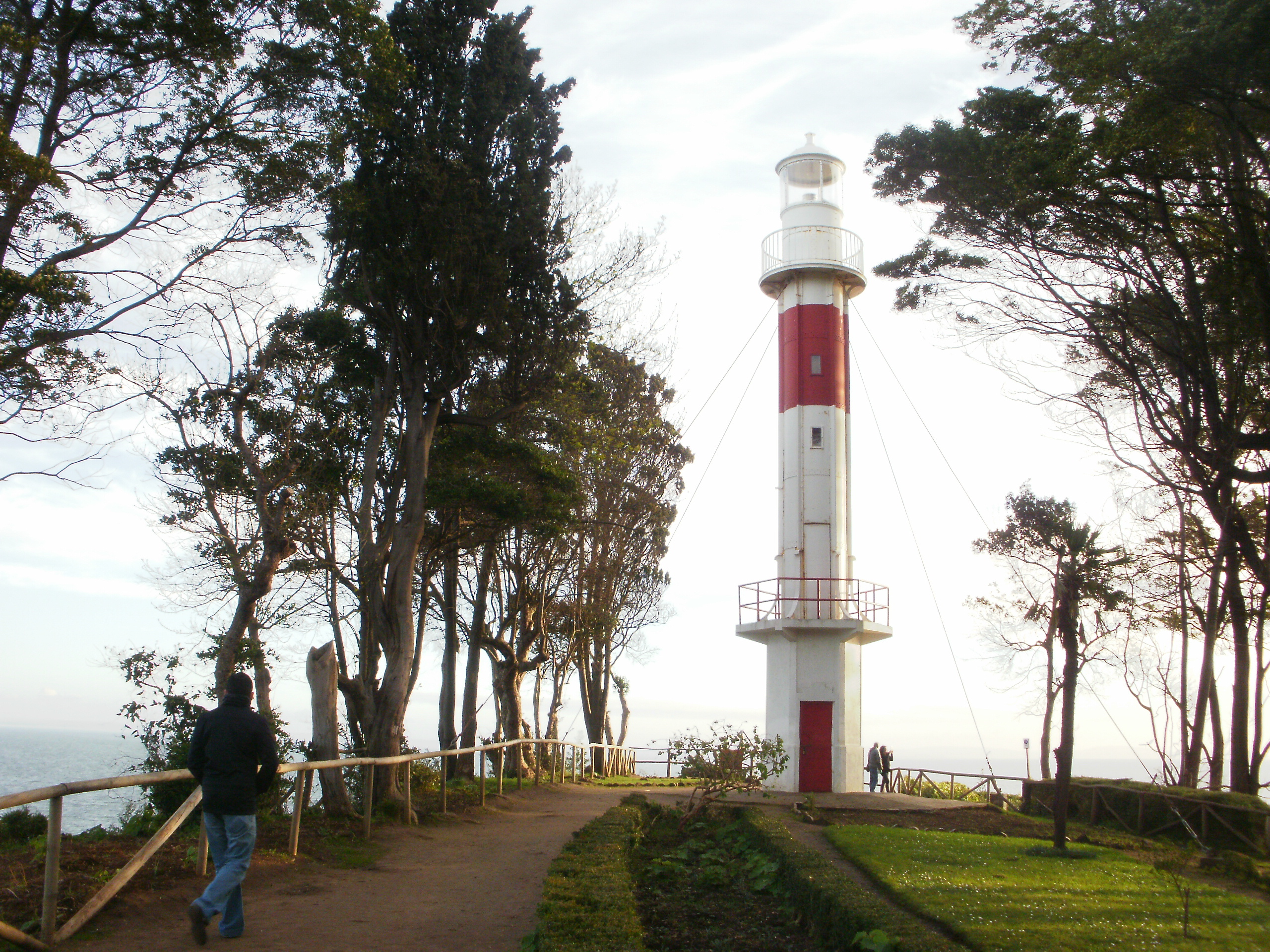 Faro emplazado en el Parque Lota.